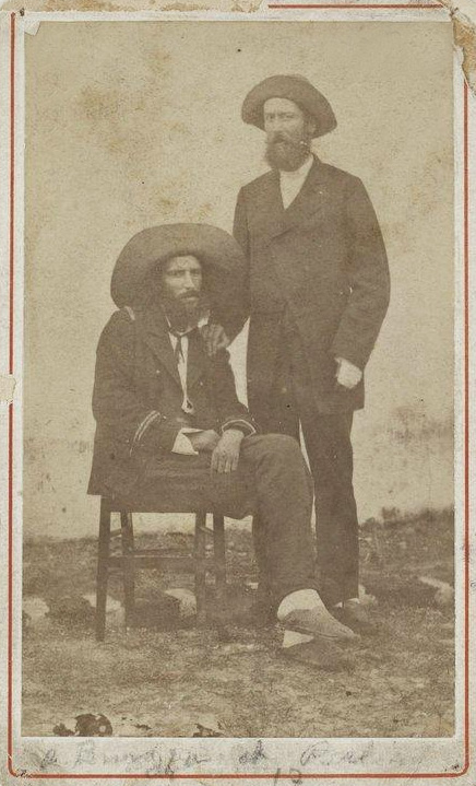 Pierre Paul François Camille Savorgnan de Brazza, à gauche et assis ; Noël Eugène Ballay, à droite et debout.